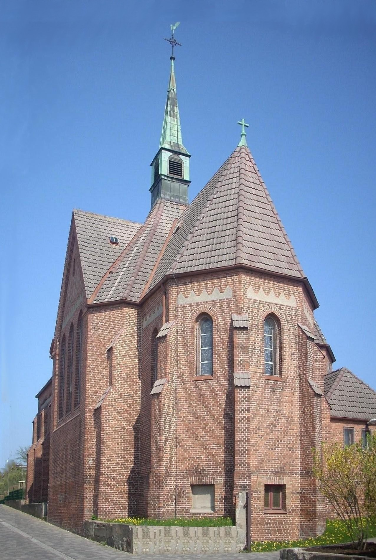 Kath. Kirche St. Bonifatius, Bergen auf Rügen, Deutschland